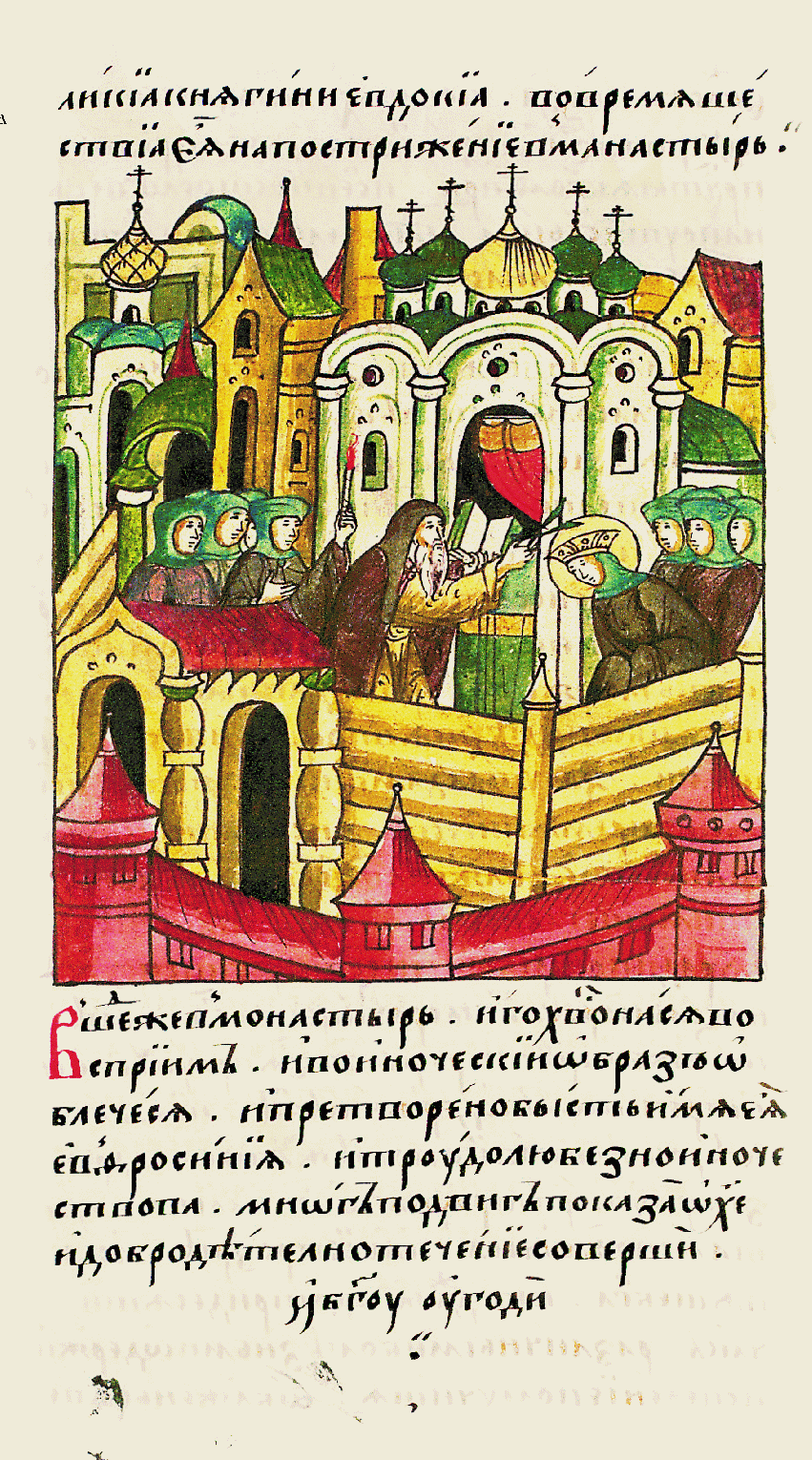 Войдя в мона- стырь, приняла княгиня на себя иго Христово, обле- клась в иноческий об- раз, и нарекли ей имя Евфросиния; и, прово- дя иноческую жизнь, совершила она много подвигов во славу Христа, добродетельно прожила жизнь и уго- дила Богу. княгини Евдокии во время ее шествия на постриг в монастырь.]